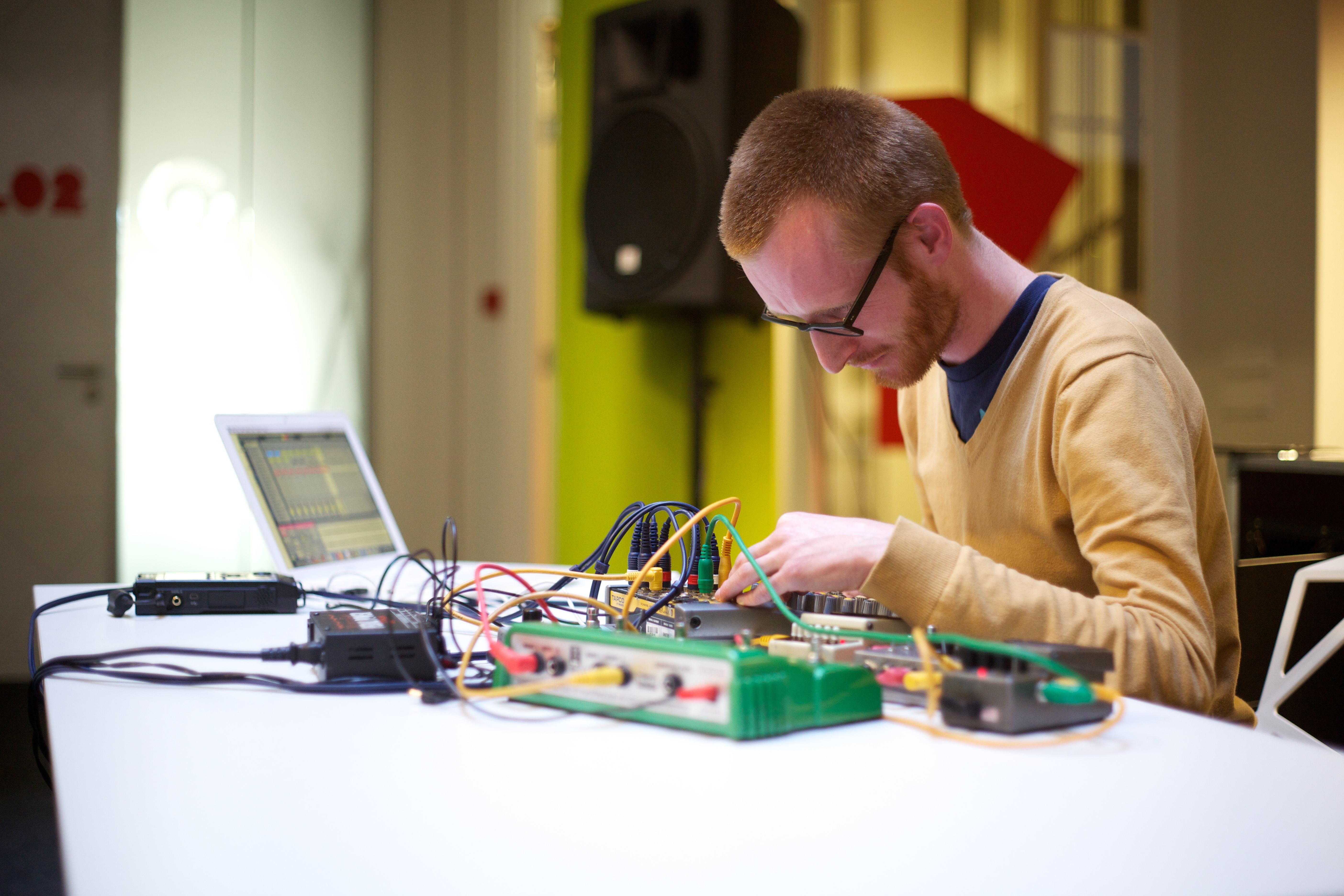 Het Geluid van Nederland (GvNL) organiseerde samen met Wikimedia Nederland Wiki Loves Sound, een gratis dag- en avondprogramma over het unieke geluidenarchief van het Nederlands Instituut voor Beeld en Geluid en het hergebruik daarvan. Naast een Wikipedia Edit-a-thon werd er een bijzondere Hoorspel-workshop georganiseerd door het experimentele radiostation Radio MOBi. Ook werd de nodige aandacht besteed aan de winnaars van de wedstrijden die het afgelopen jaar zijn gehouden door Het Geluid van Nederland. De avond werd afgesloten met een bijzondere muzikale live mix van de geluiden uit het GvNL-archief door Machinefabriek.